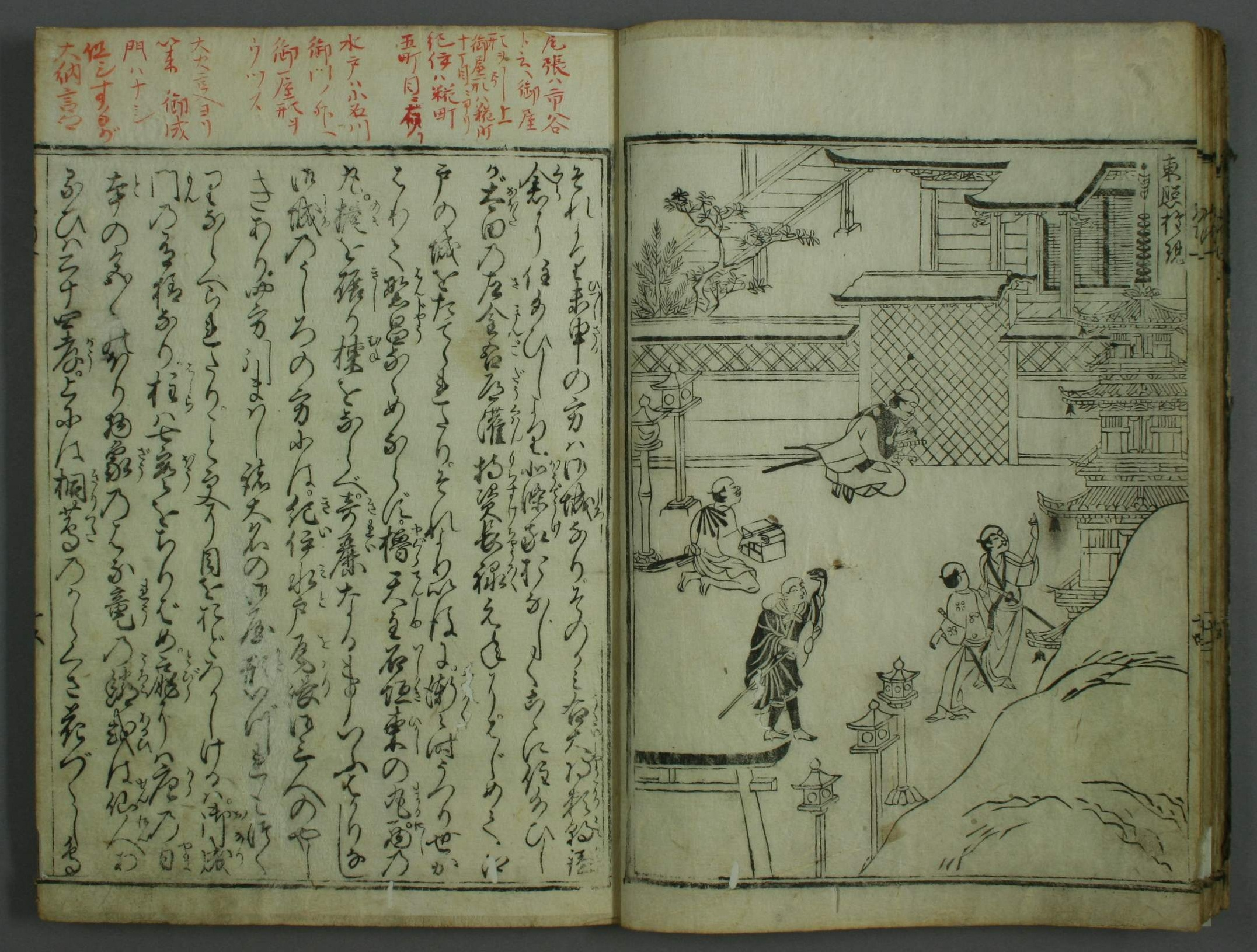 Tokaido meisho ki (東海道名所記) - volume 1 page 16